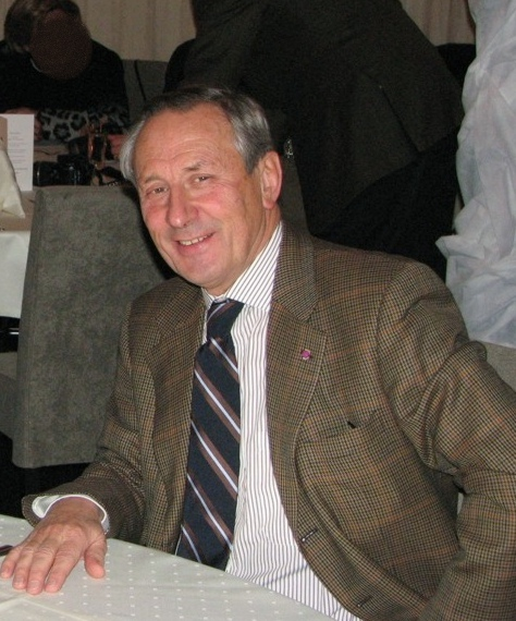 Manfred Schunck, Politiker und Apotheker, Parteizugehörigkeit CSP, Präsident des Rates der Deutschsprachigen Gemeinschaft (Belgien) von 1994 bis 1999